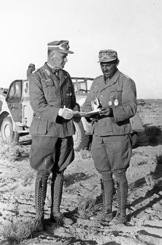 Kampf in Nordafrika: General der Panzertruppen Crüwell und sein Generalstabschef Oberstleutnant i.G. Bayerlein [rechts], der Anfang Januar 1942 für besonders mutigen und persönlichen Einsatz mit dem Ritterkreuz ausgezeichnet wurde bei Besprechnung der Lage in Nordafrika. PK-Aufnahme: Kriegsberichter: Zwilling 1257-42 "Fr." "Fr.OKW" Jan.42